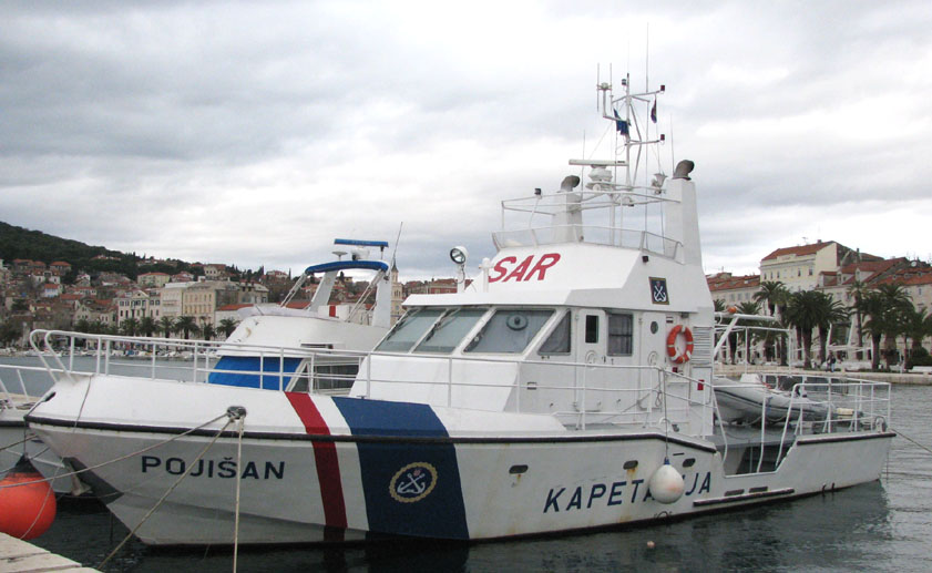 Brod Lučke kapetanije Split "Pojišan"